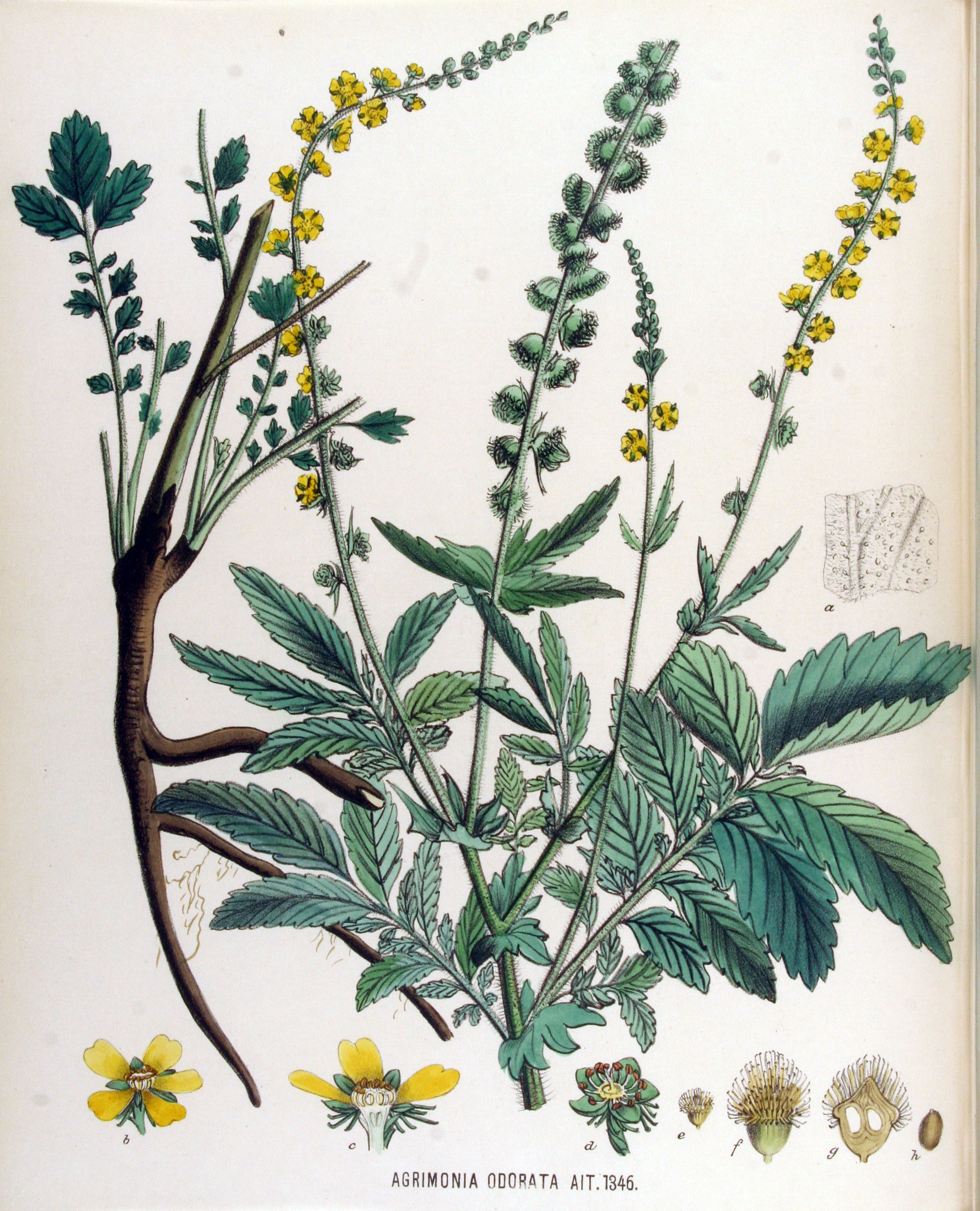 Agrimonia procera Wallr. (Syn. Agrimonia odorata auct. non Mill.)